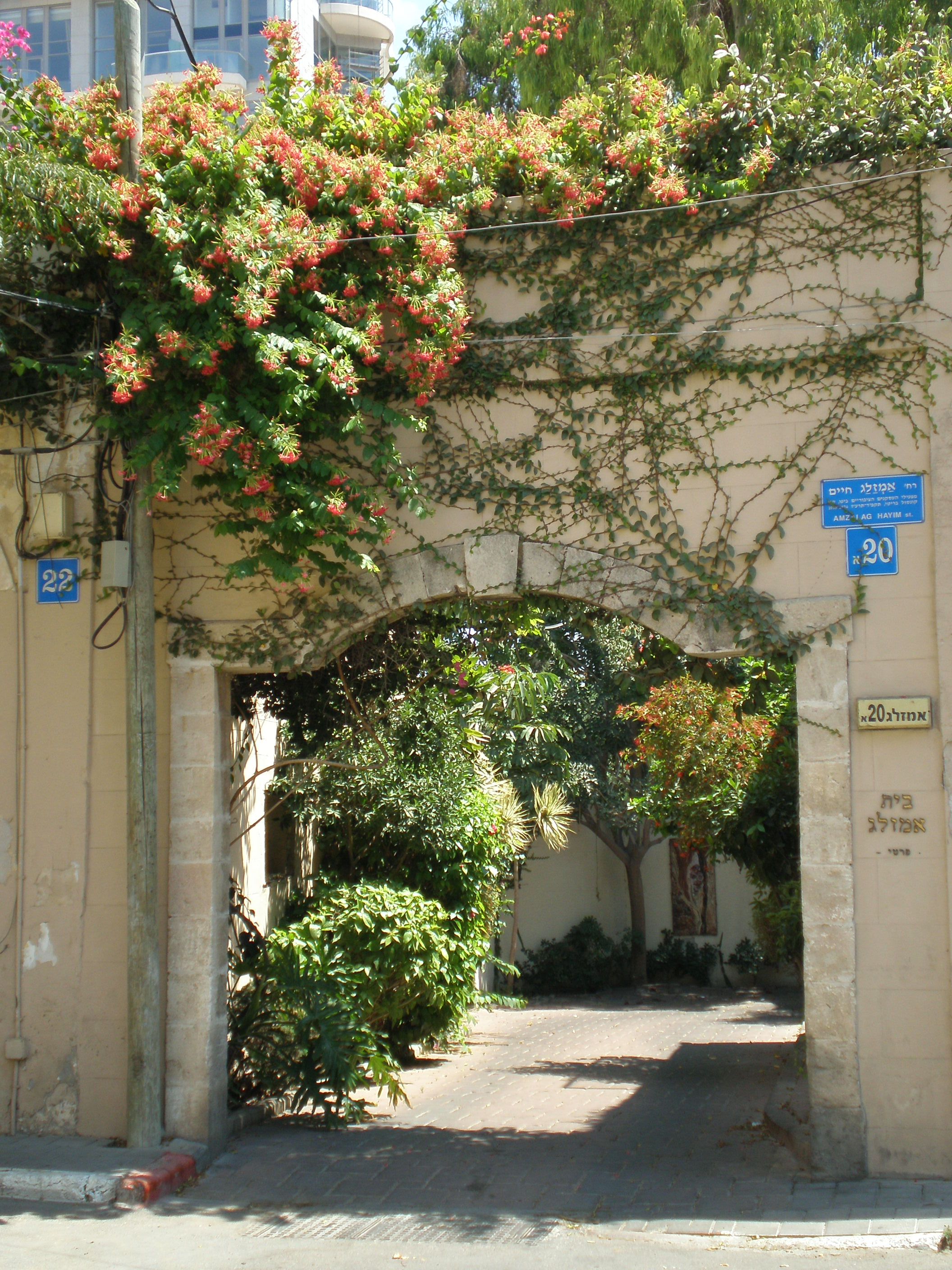 Amzalag House (בית אמזלג), 20A Amzalag Haim st., Neve Tzedek, Tel Aviv, Israel.